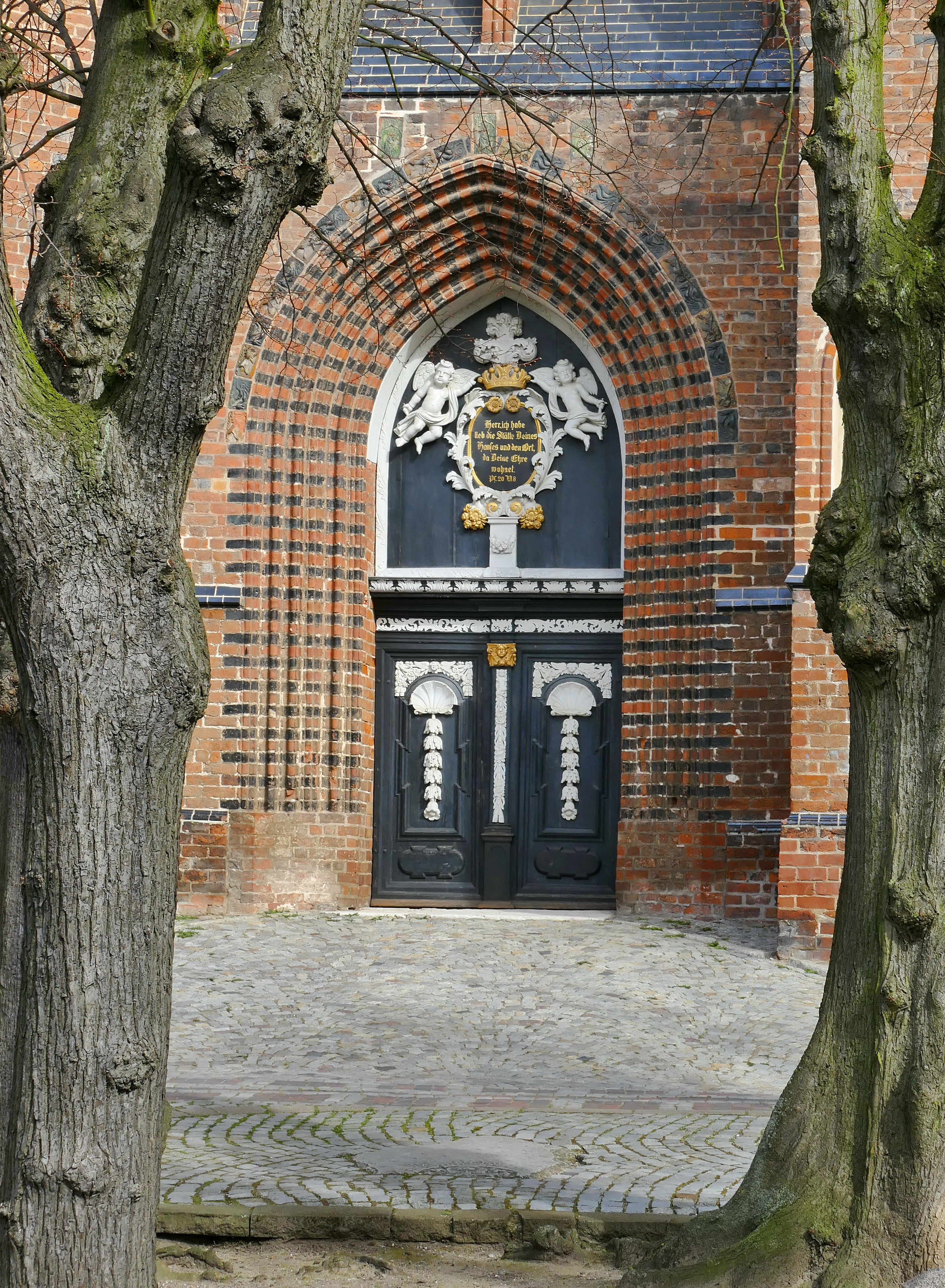 Die St.-Nikolai-Kirche wurde 1381 bis 1487 als eine Kirche für Seefahrer und Fischer im spätgotischen Stil erbaut und gehört zum UNESCO-Weltkulturerbe. Die Inschrift auf der Tür lautet: "Herr, ich habe lieb die Stätte Deines Hauses und den Ort, da Deine Ehre wohnet. Ps.20 V.8". Es handelt sich aber um den Psalm 26, Vers 8.